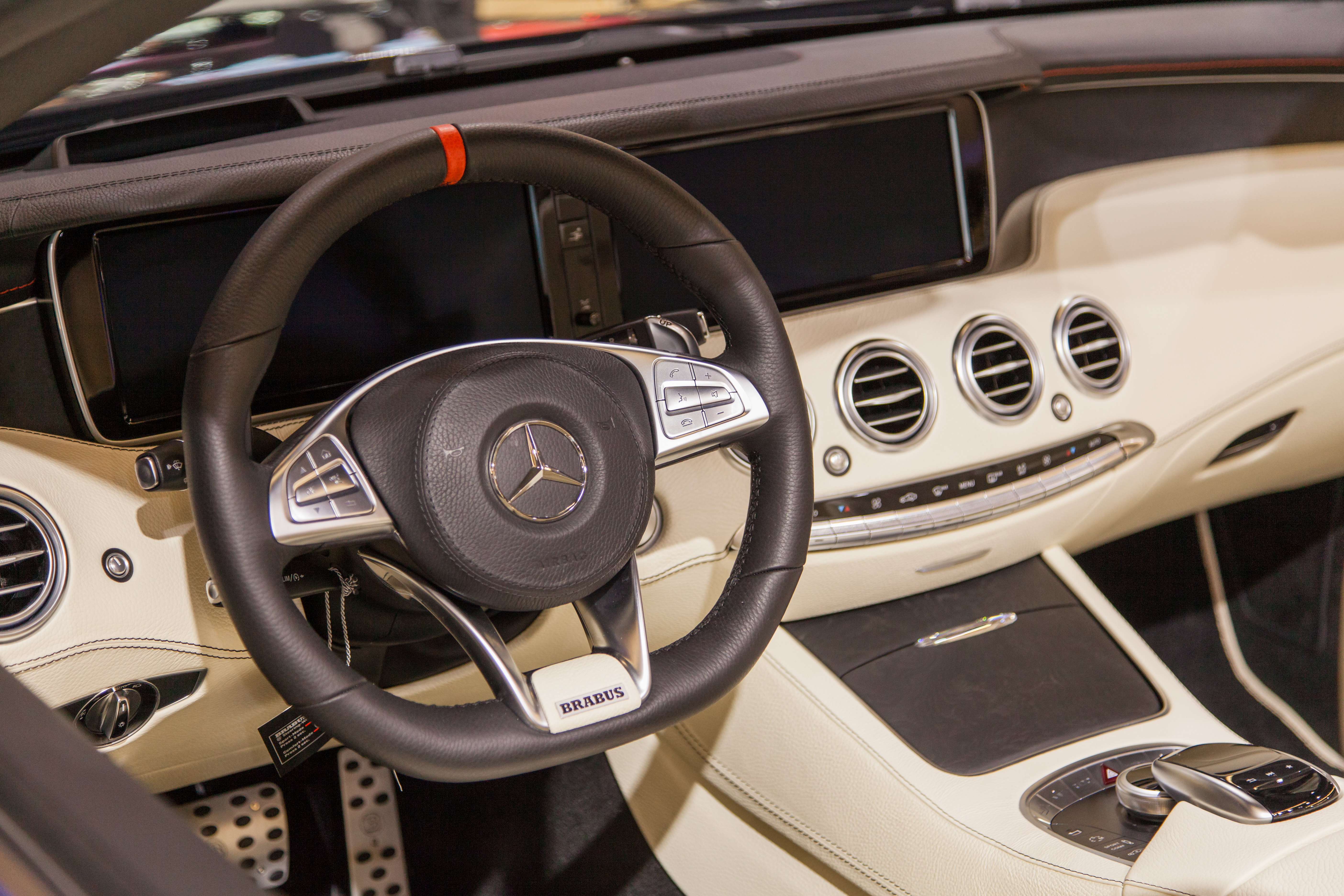 Brabus 900 Rocket Cockkpit auf der IAA 2017